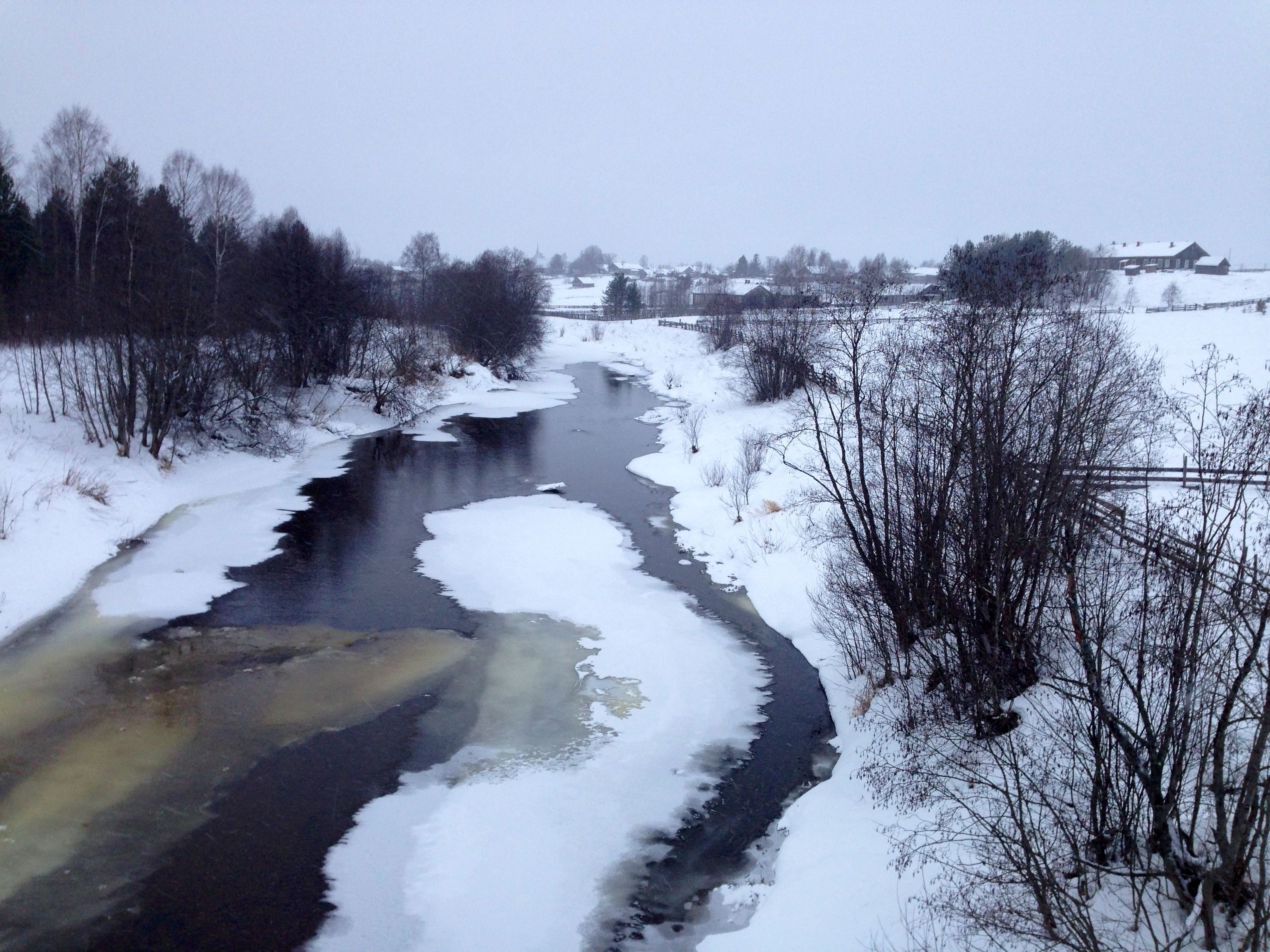 река Шарженьга, д. Логдуз, Бабушкинский район, Вологодская область